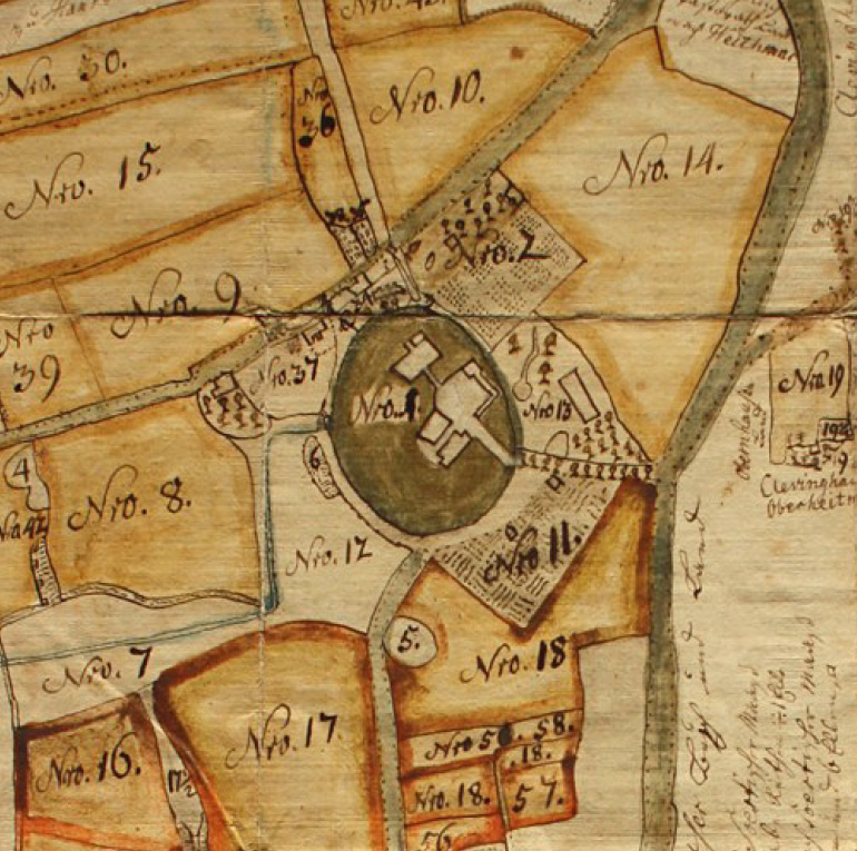 Abbildung des Hauses Weitmar auf einer Karte des Jahres 1780